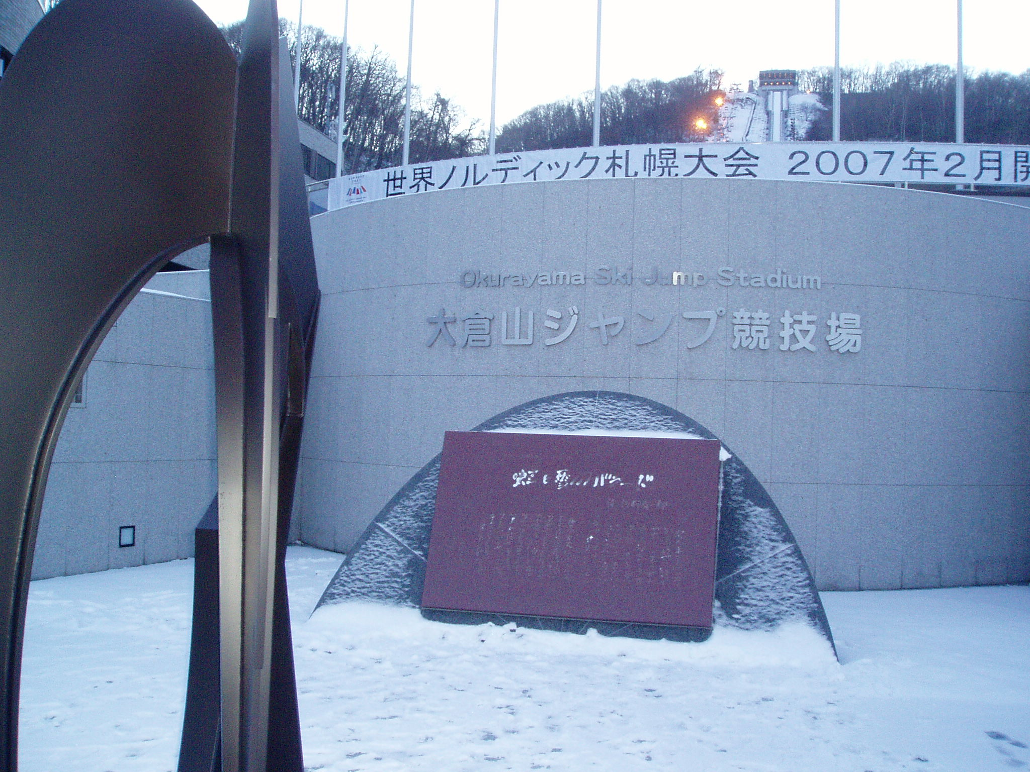 Memorial near to Okurayama ski jumping hill